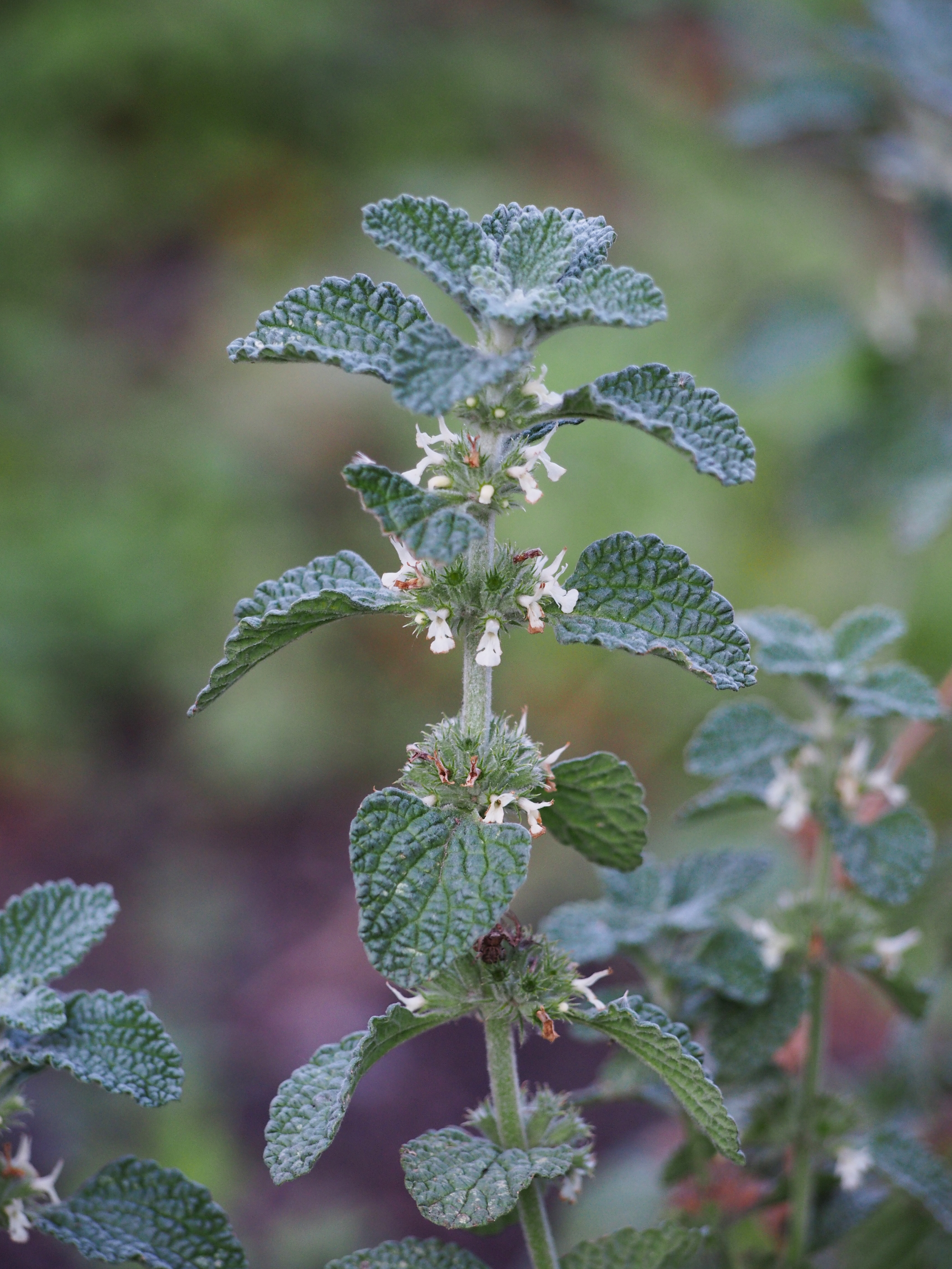 Szanta zwyczajna (Marrubium vulgare), okaz uprawiany, Ogród Botaniczny UWr, Wrocław, Polska.